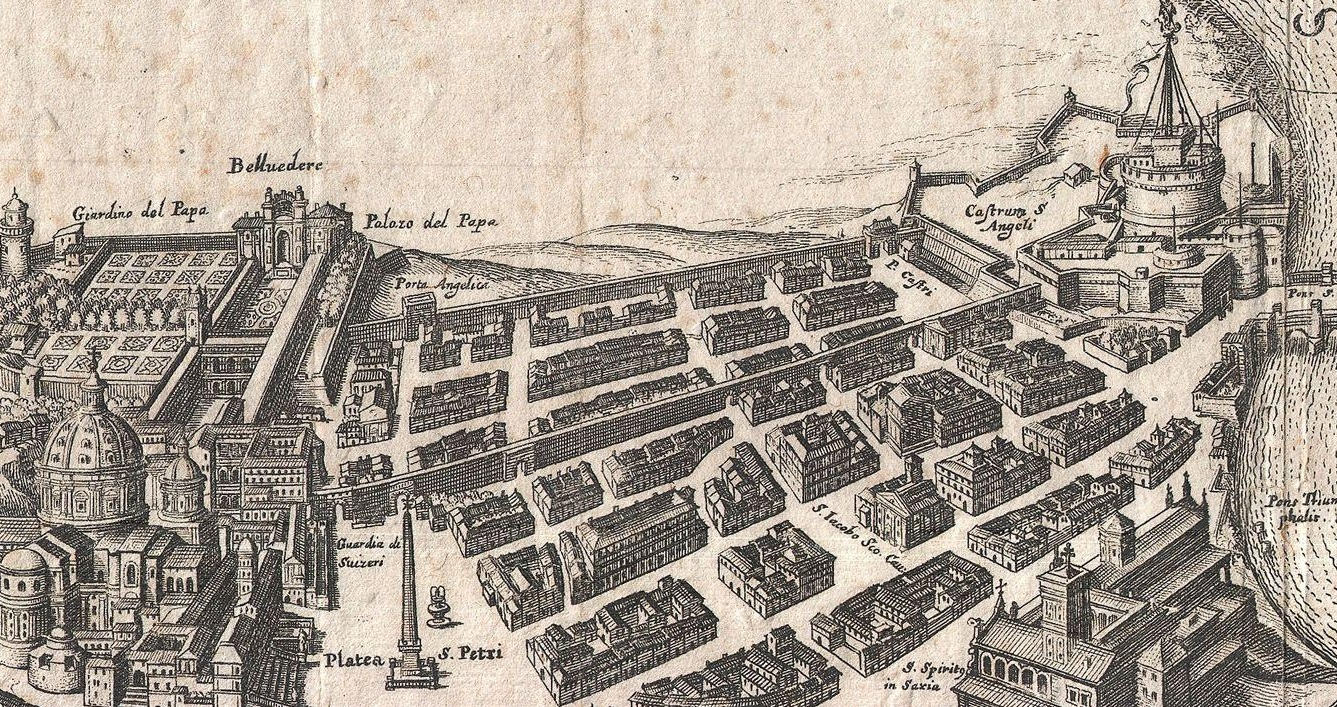 Matthäus Merian, Plan der Stadt Rom 1652, Ausschnitt: Mauern und Bebauung zwischen St. Peter und der Engelsburg; an der Spitze des Obelisken der Fluchtgang Passetto, nördlich in der Parallelmauer die Porta Angelica